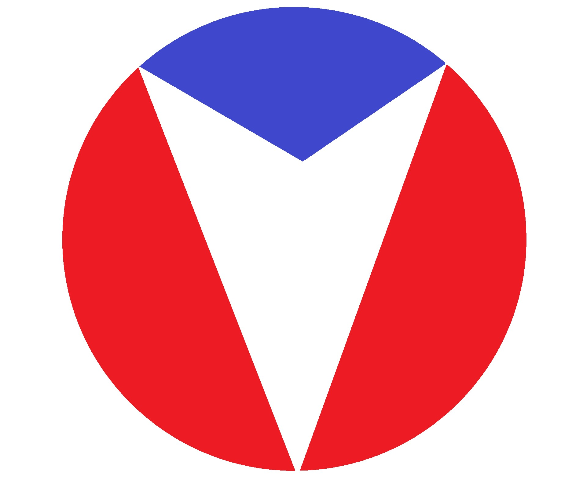 Dessin du logo de Vaillante (PhotoFiltre).